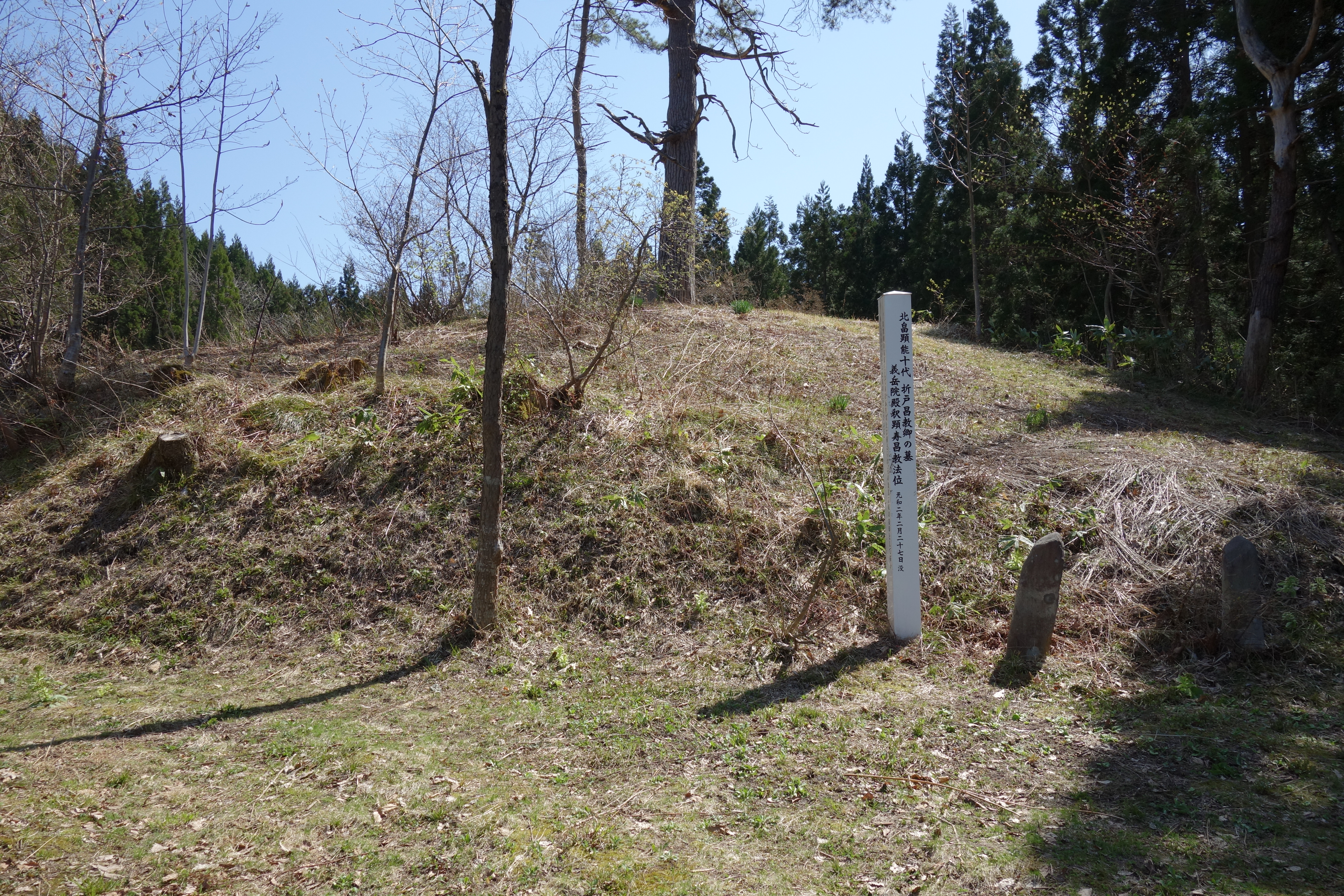 北畠昌教の墓